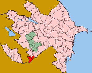 Map of Azerbaijan showing Zangilan (Zəngilan) rayon.